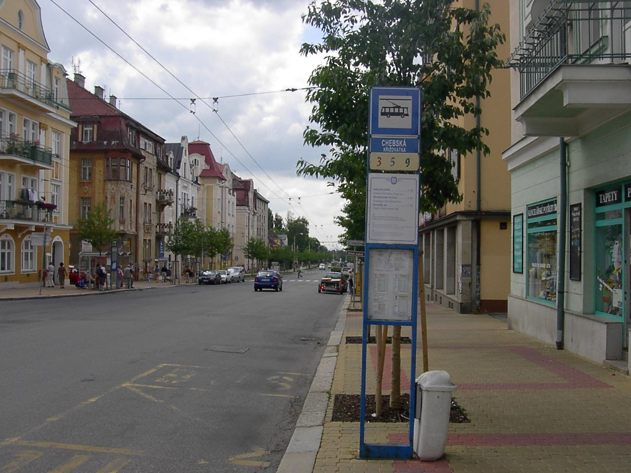 Zastávka Chebská křižovatka v Mariánských Lázních. Die Haltestelle "Eger Kroizung" in Marienbad. The stop "Cheb cross" in Marienbad.